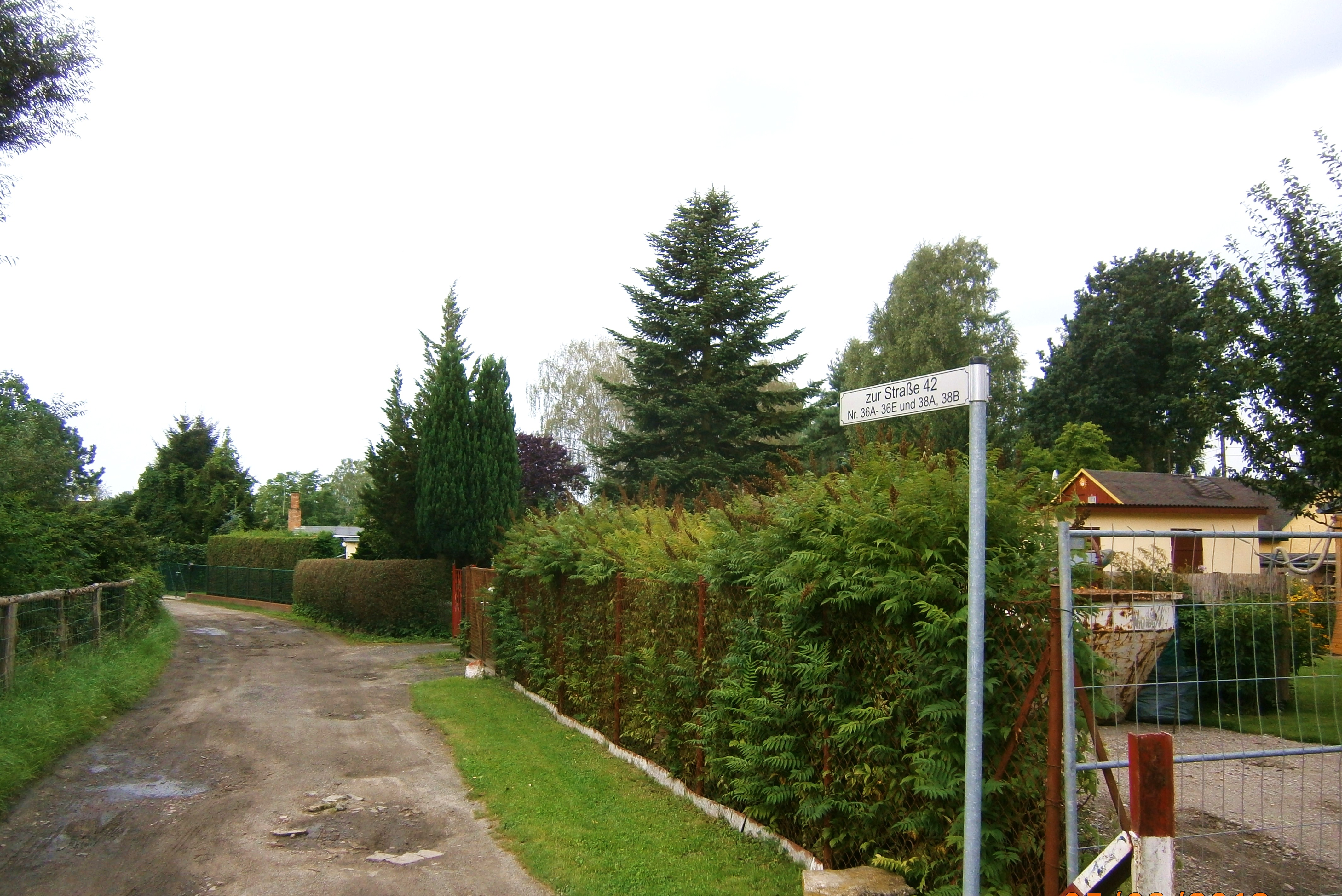 Straße 42 (Zufahrt zu den Ergänzungsgrundstückenwestlich vom Teichberg):Straße im Ortsteil Berlin-Karow (Blickrichtung: südwärts )